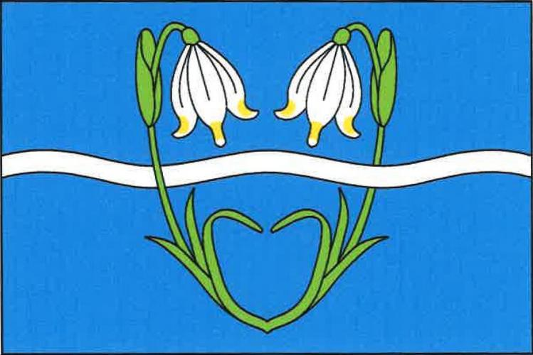 Třebichovice vlajka